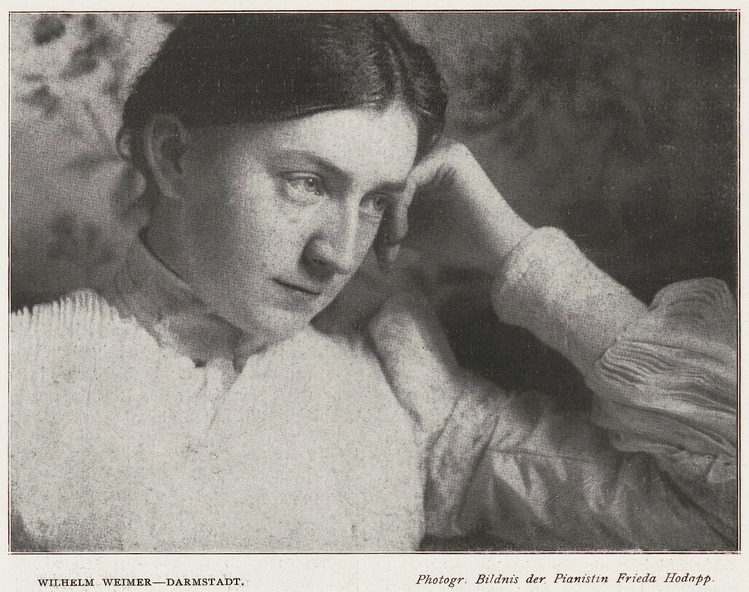 Wilhelm Weimer: Portrait der Pianistin Frieda Hodapp